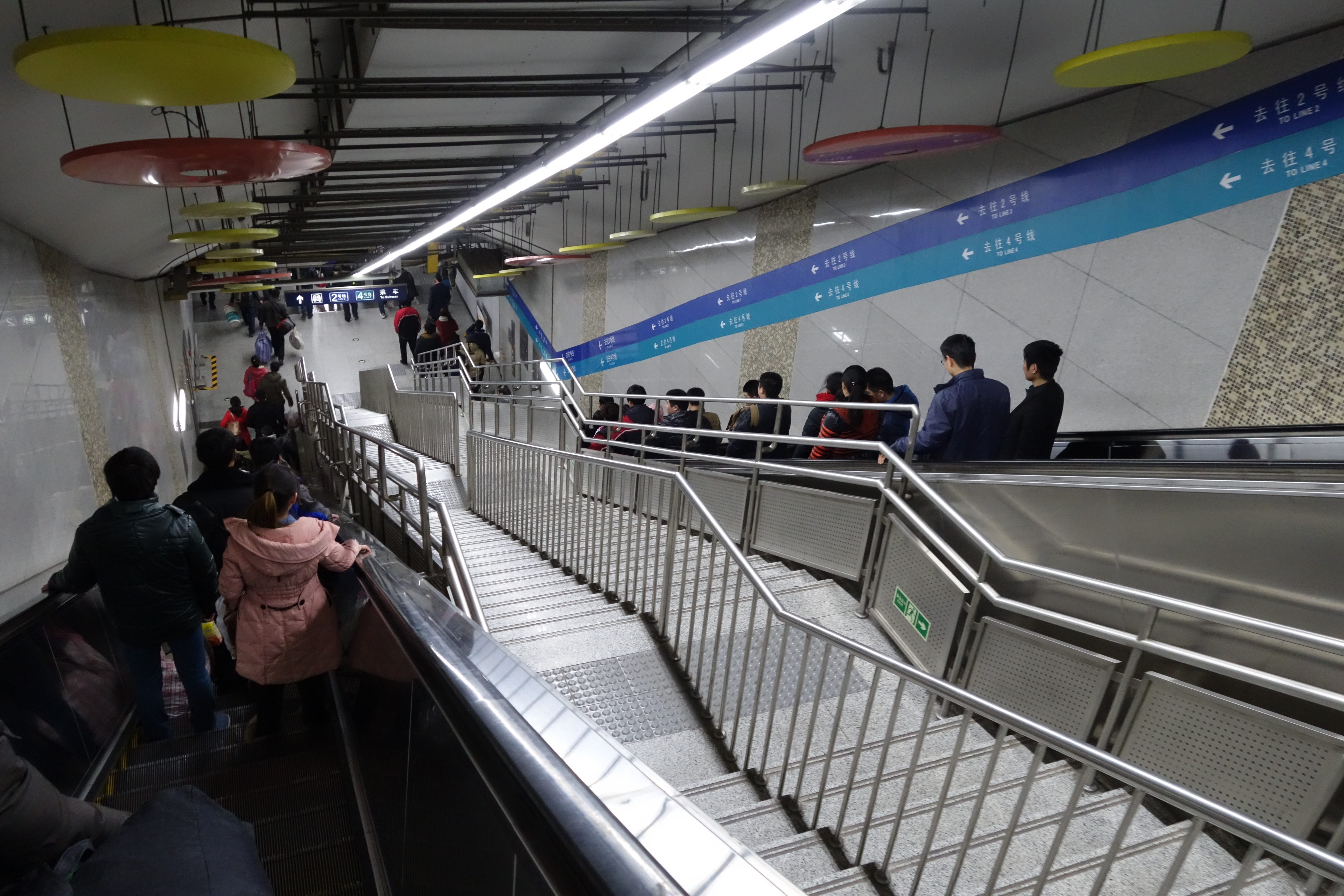 西直门站长换乘通道